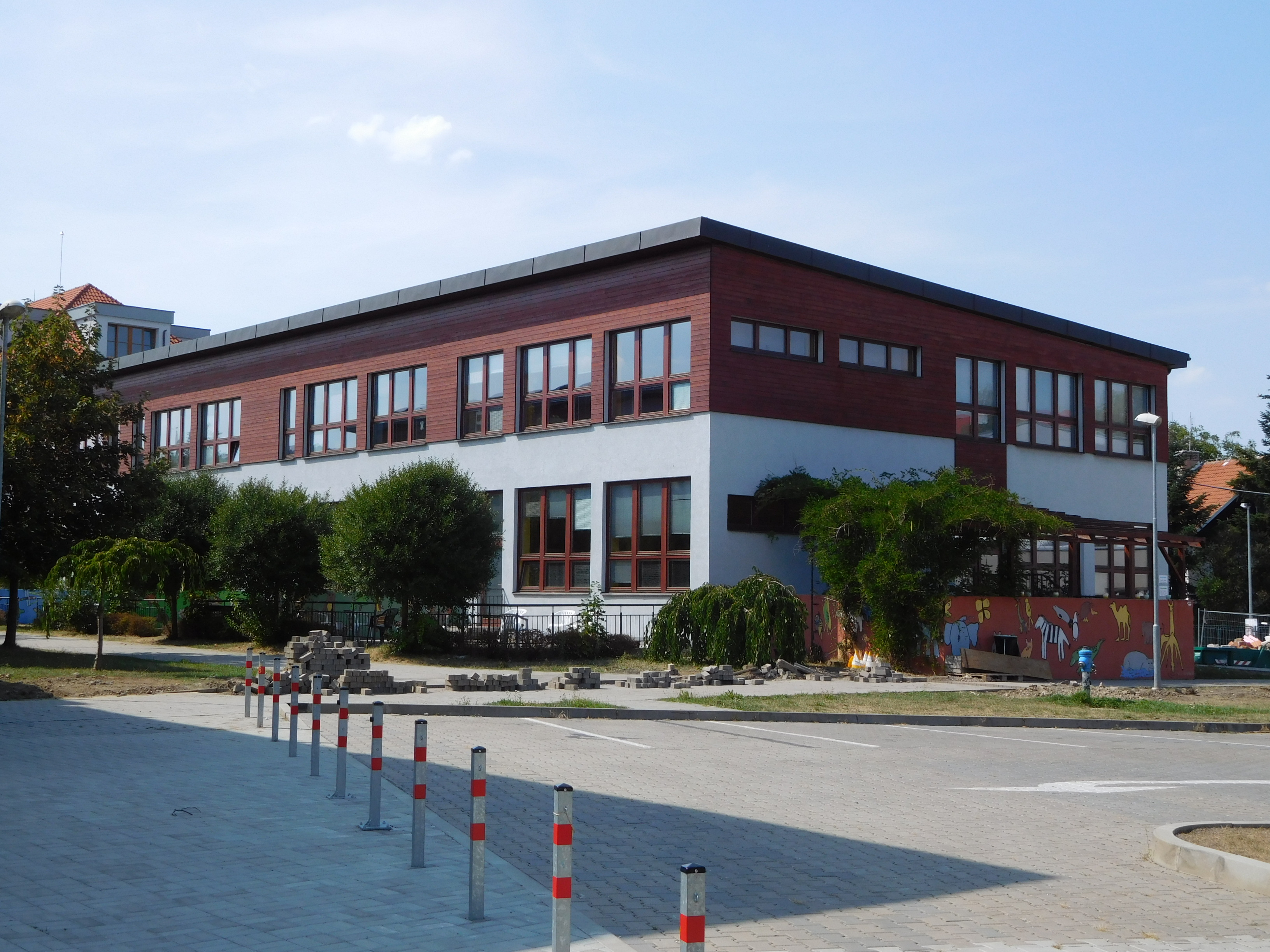 Praha - Kunratice, Základní škola Kunratice